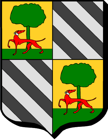 Armoiries de la famille d'Humières